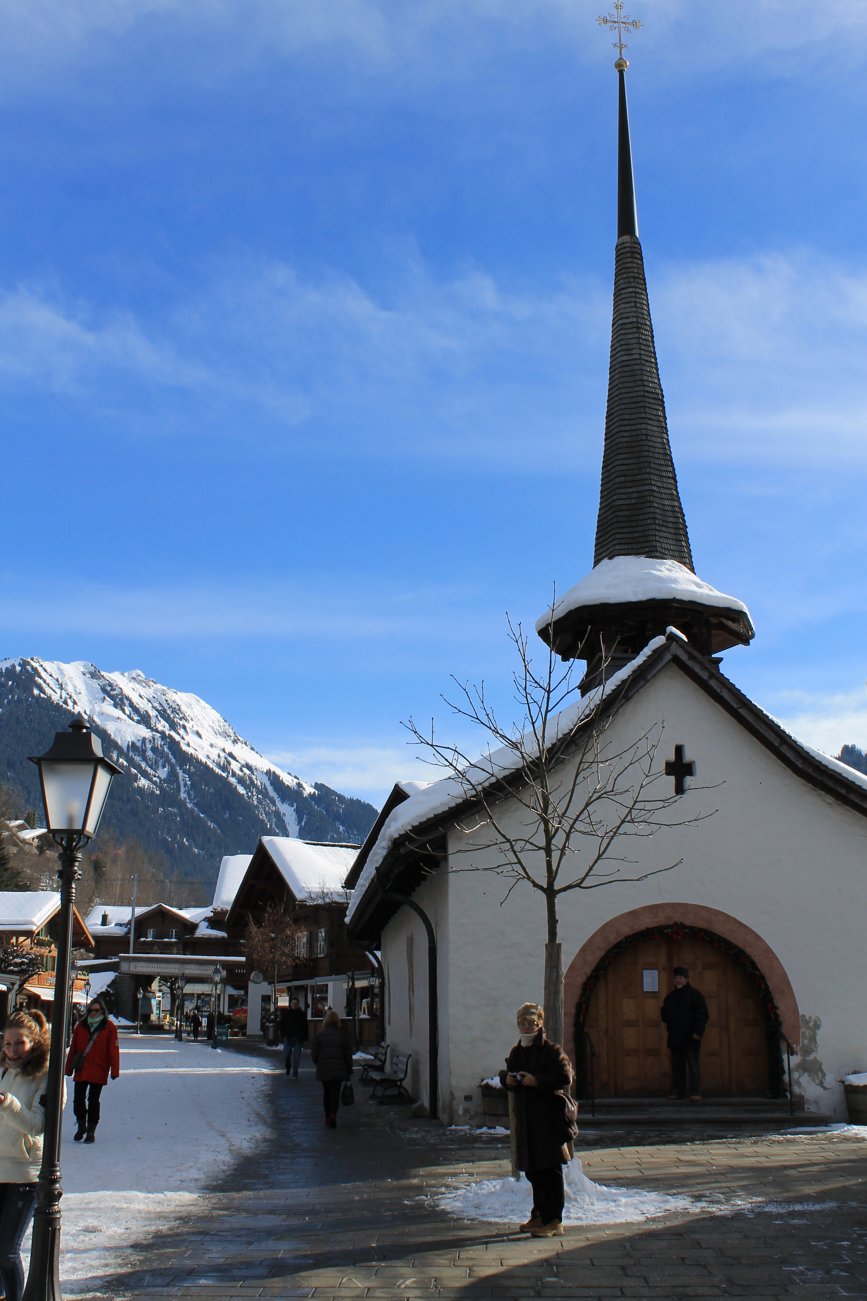 Gstaad